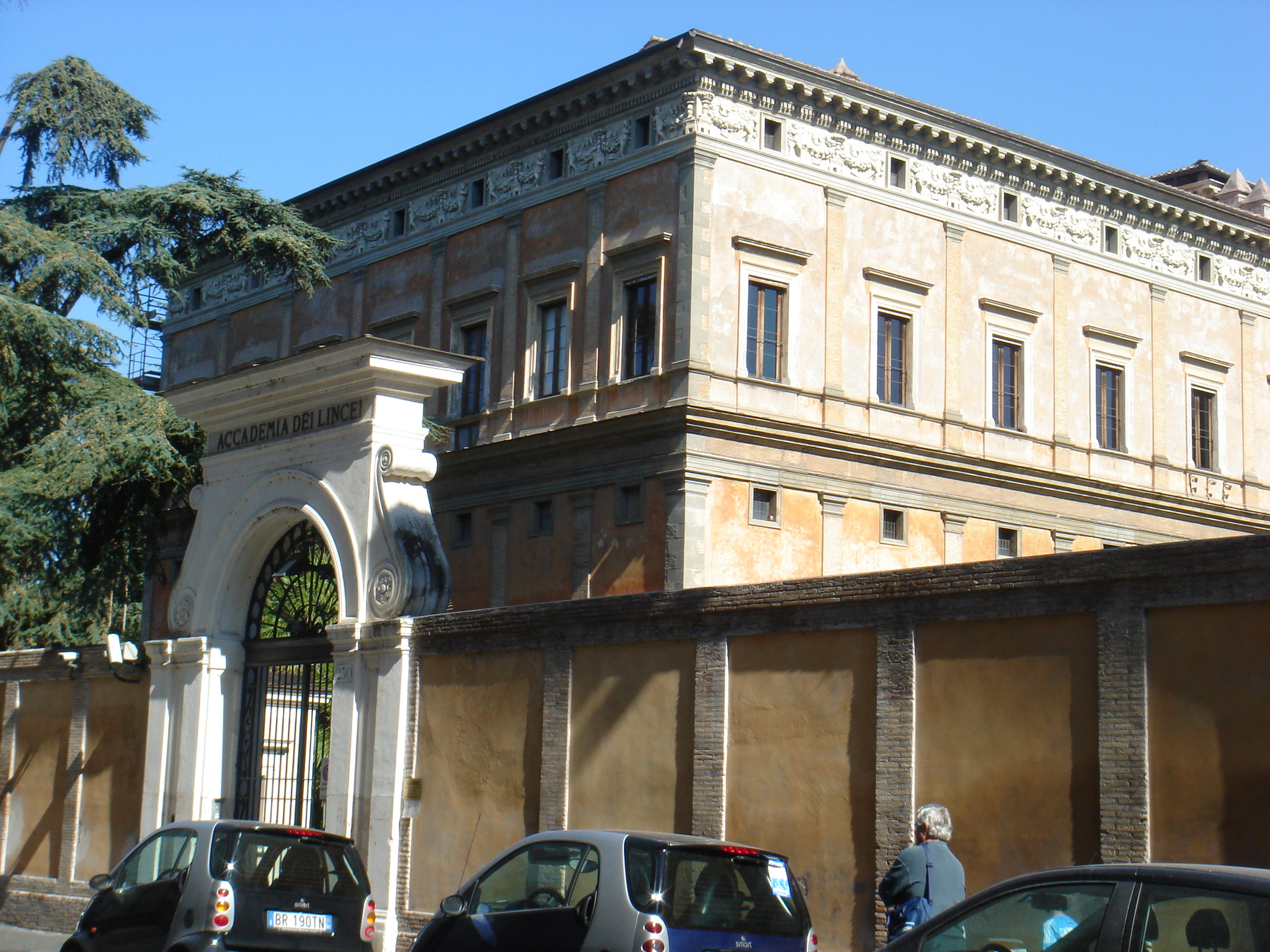 Roma, Trastevere: Accademia dei Lincei